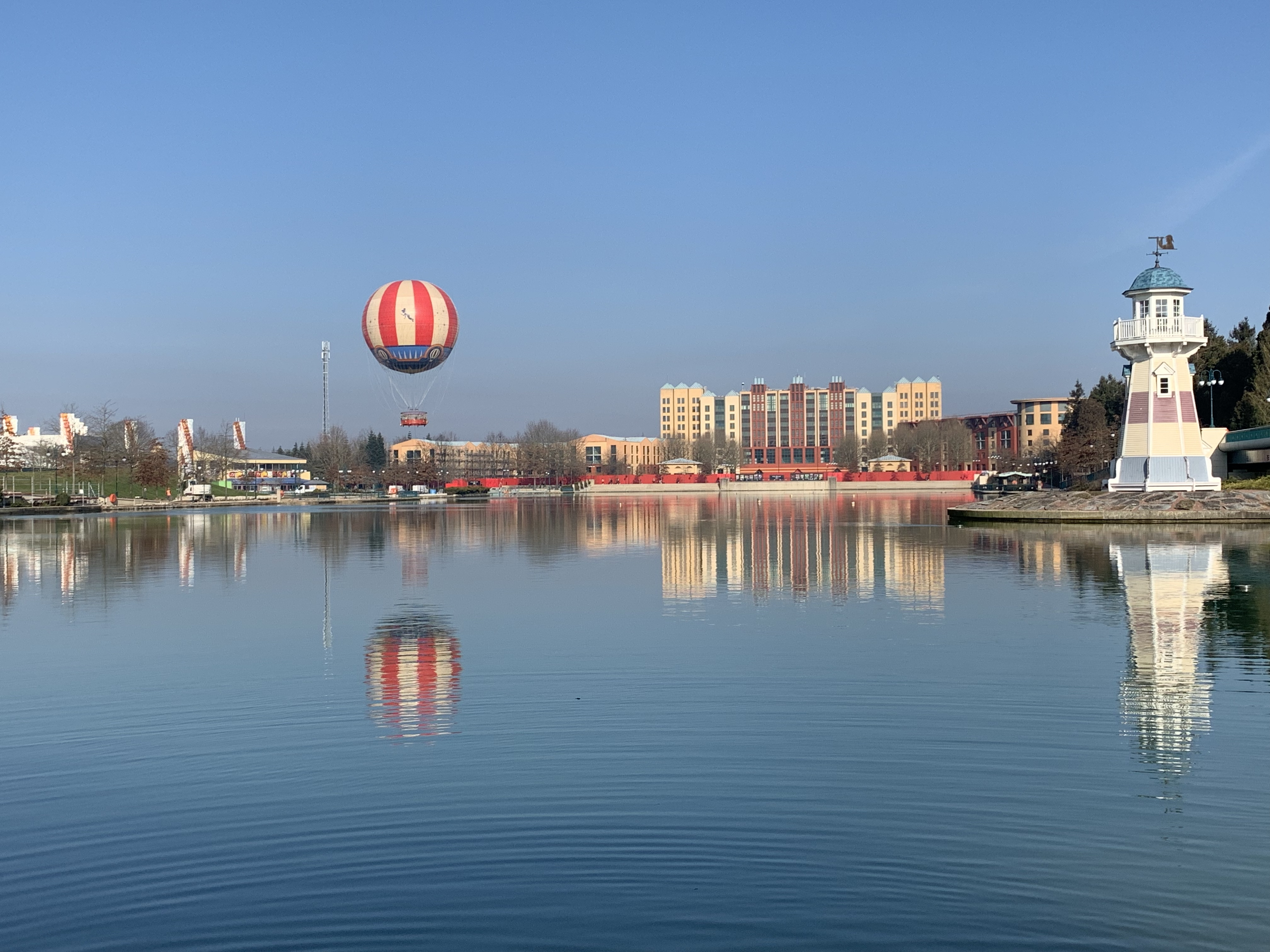 Disney Land Paris.